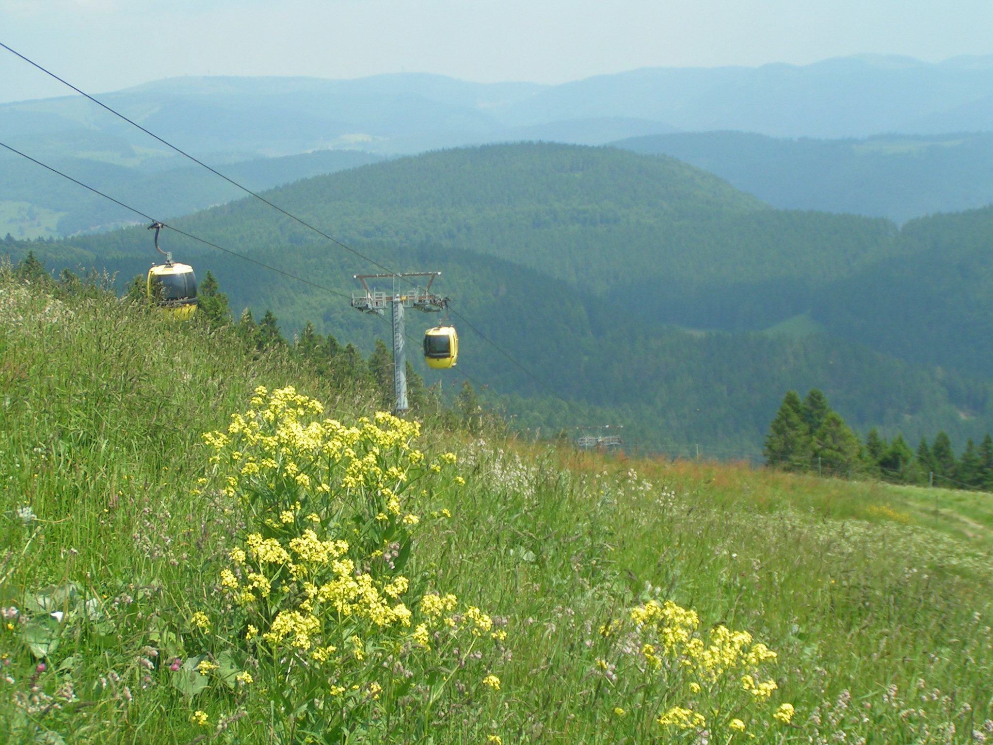 Seilbahn auf den Belchen, sommerlicher Blick talwärts von der Bergstation aus